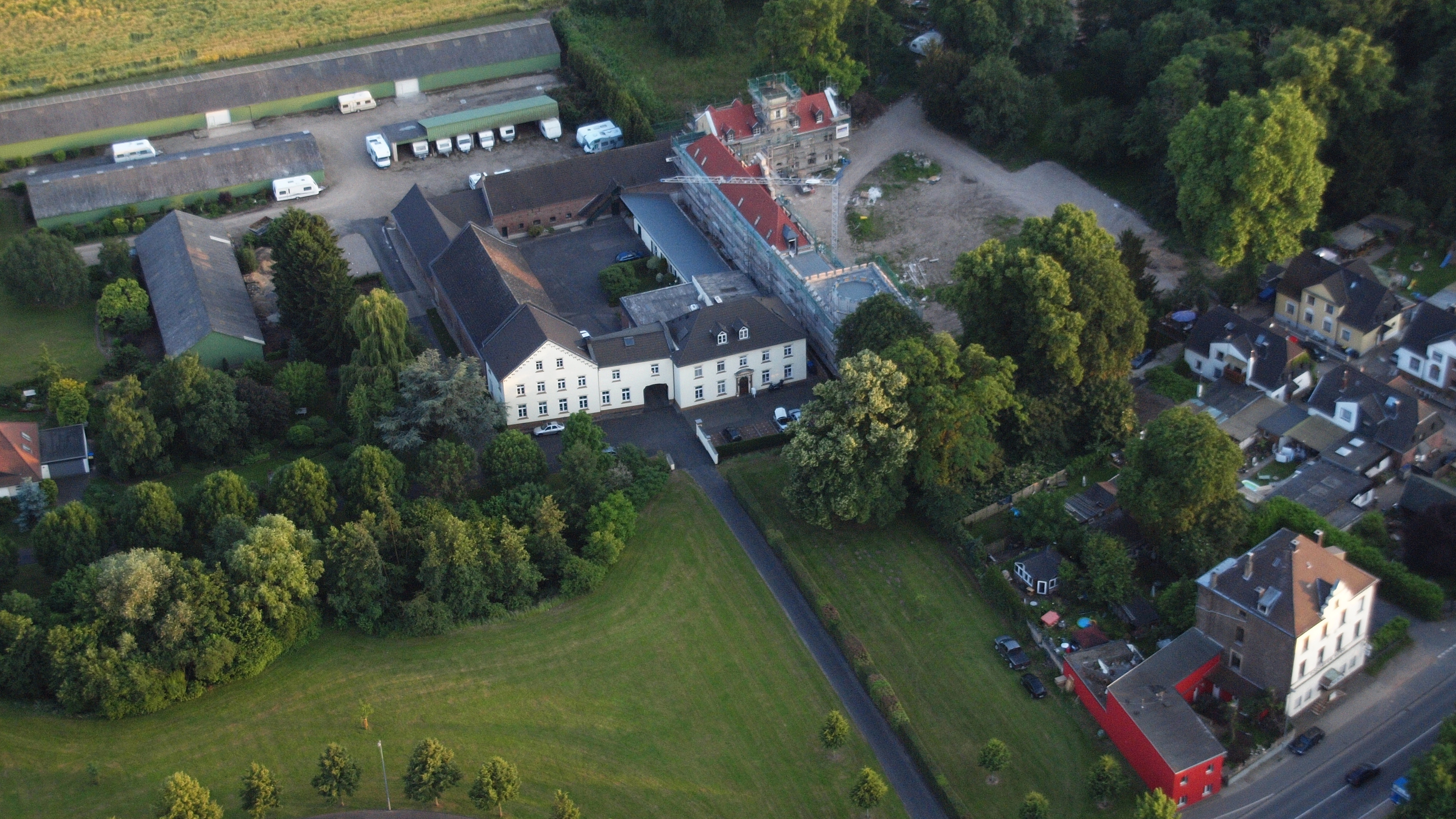 Godorfer Burg, Luftaufnahme (2014)